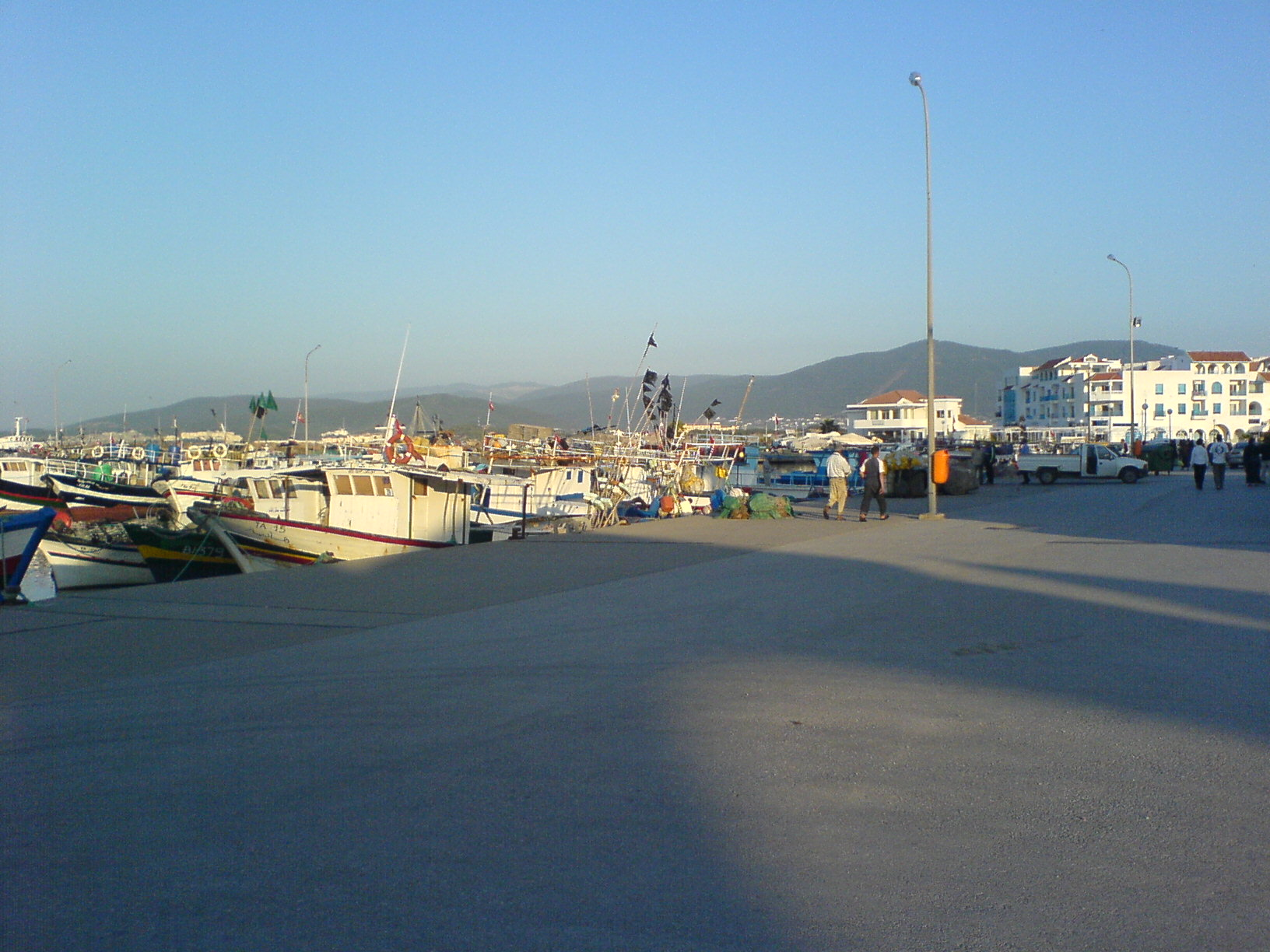 Tabarka's Harbour, Tunisia